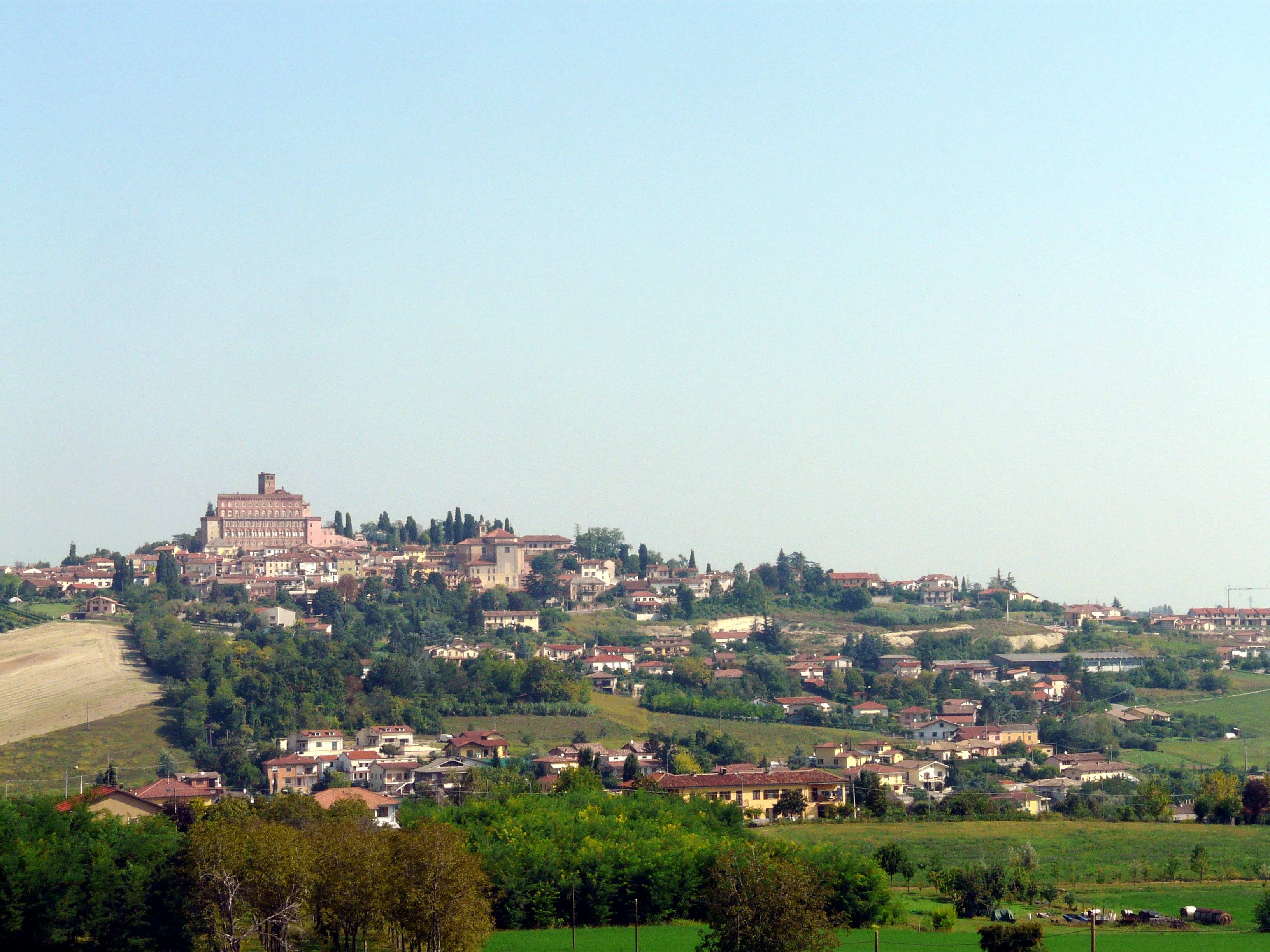 Panorama di San Giorgio Monferrato, Piemonte, Italia